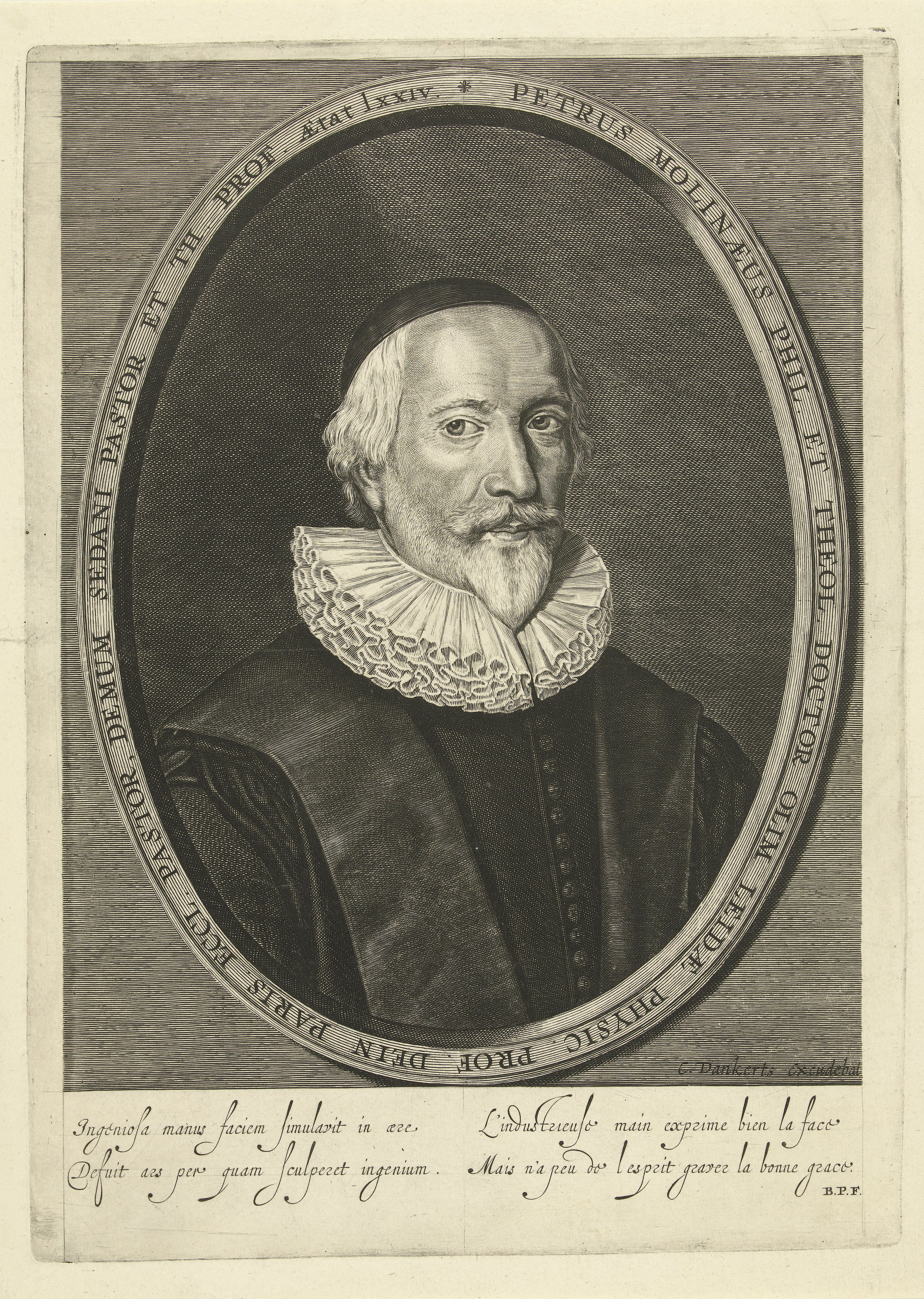 IdentificatieTitel(s): Portret van Pierre du Moulin op 74-jarige leeftijd. Petrus Molinaeus Phil. (...) et Th. prof. Aetat LXXIV (titel op object)Objecttype: prent Objectnummer: RP-P-BI-6718Catalogusreferentie: Hollstein Dutch 147-2(3)Opschriften / Merken: verzamelaarsmerk, verso, gestempeld: Lugt 2228Omschrijving: Portret van Pierre du Moulin, gekleed in toga met plooikraag. Borststuk in ovale omlijsting. In marge onder vers in Latijn.VervaardigingVervaardiger: prentmaker: Cornelis van Dalen (I) uitgever: Cornelis Danckerts (vermeld op object) schrijver: Monogrammist BPF (vermeld op object)Plaats vervaardiging: AmsterdamDatering: 1632 - 1665Fysieke kenmerken: gravureMateriaal: papier Techniek: graveren (drukprocedé)Afmetingen: plaatrand: h 327 mm × b 237 mmOnderwerpWie: Pierre du MoulinVerwerving en rechtenVerwerving: onbekendCopyright: Publiek domein